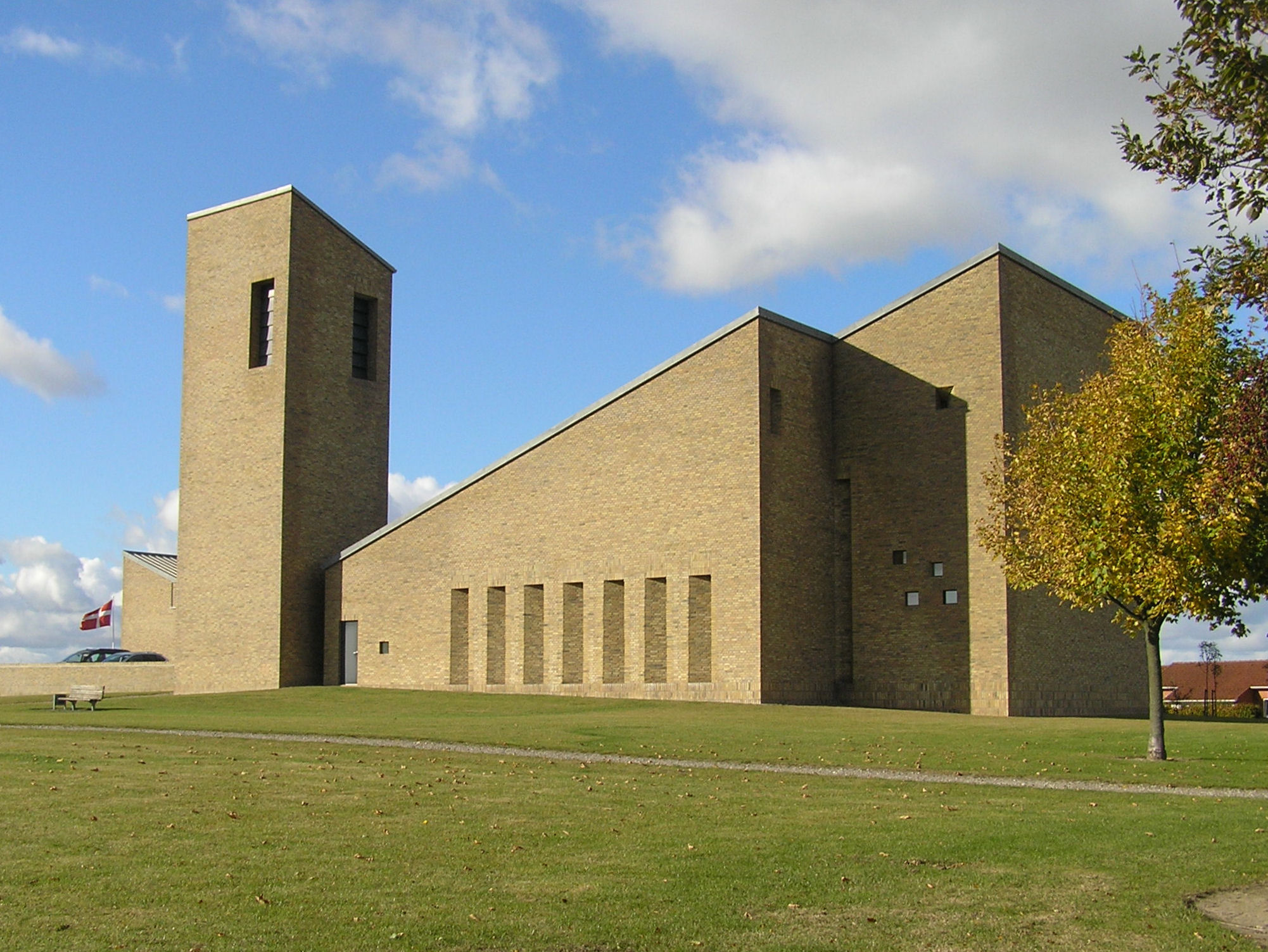 Antvorskov Kirke, Slagelse, Danmark Antvorskov Kirke er indviet 2005-04-11 af biskop Jan Lindhardt. Arkitekt på byggeriet var Anders Bové Christensen, Aarhus.